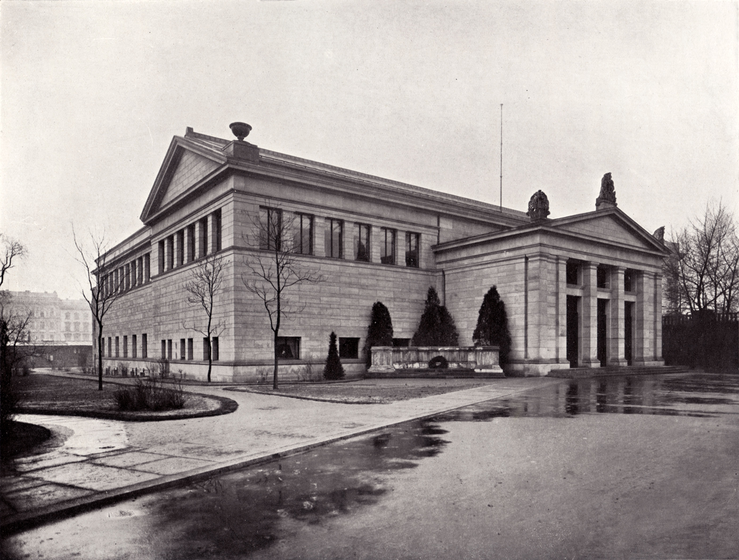 Berlin - erster Bau des Pergamonmuseums von Fritz Wolff um 1905